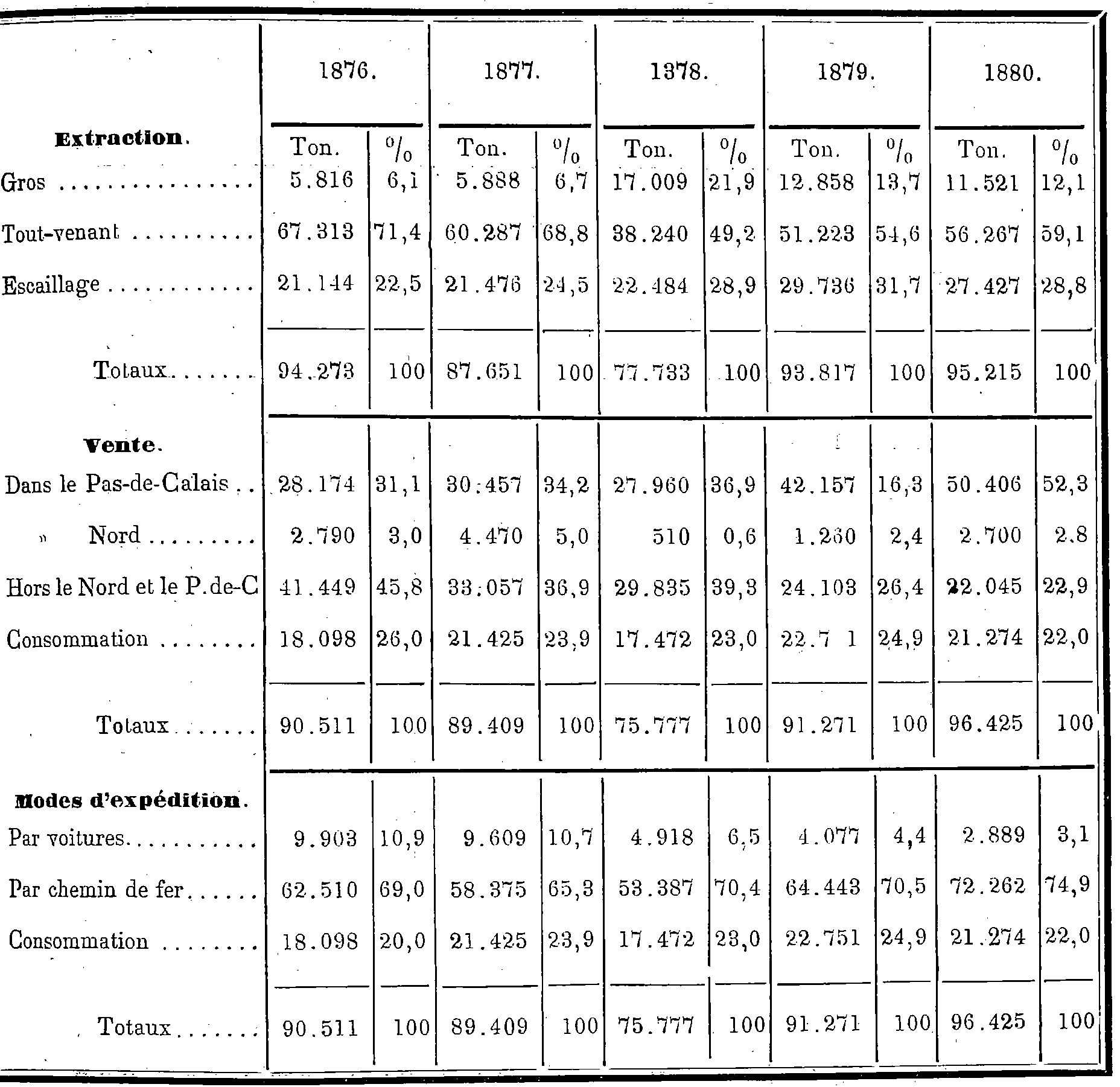 Renseignements sur la production de la Compagnie des Charbonnages de Réty, Ferques et Hardinghen de 1876 à 1880.